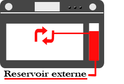 Four vapeur ou combiné vapeur avec technologie de générateur de vapeur externe au four. Elle consiste en une bouilloire qui par une buse envoie de la vapeur dans l'enceinte du four